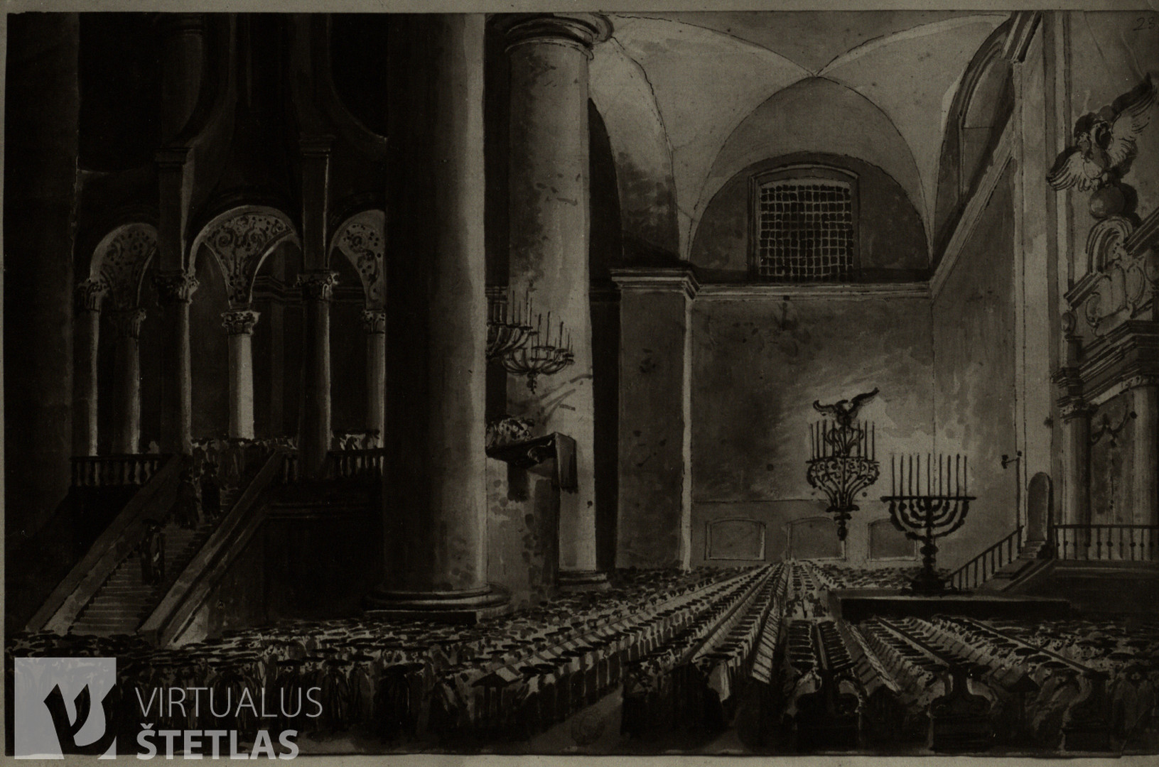 Didžiosios Vilniaus Sinagogos interjeras pamaldų metu